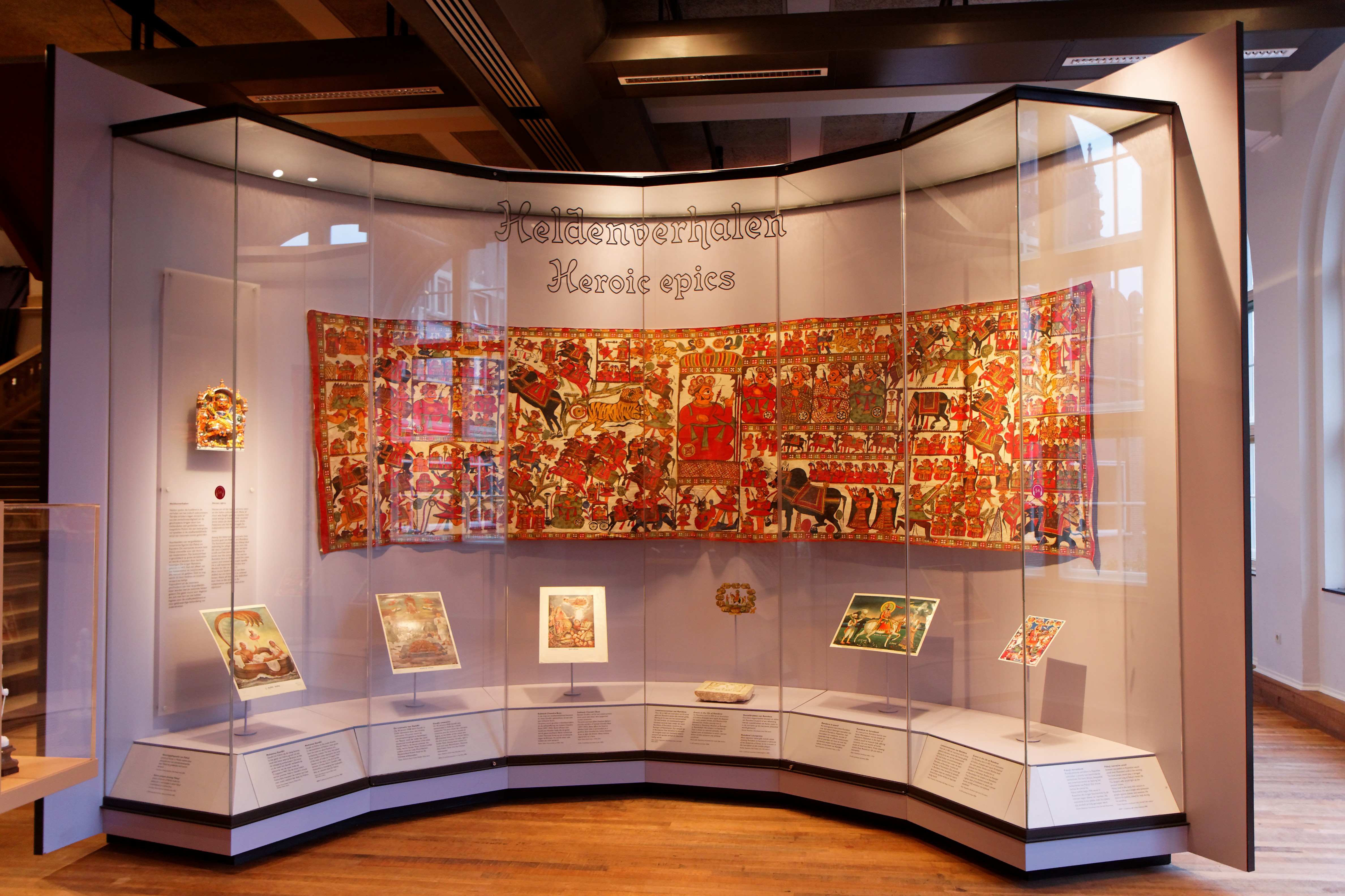 Pabuji-Verteldoek (4669-1) 090626-150441_ 1923_50D_raw